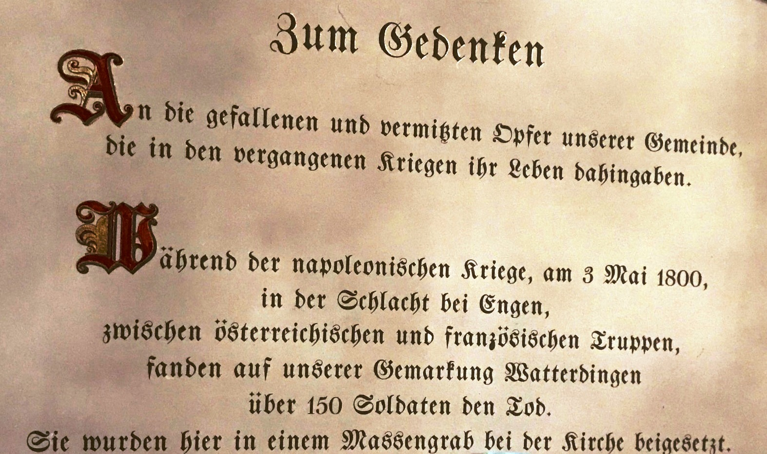 Watterdingen liegt westlich von Engen. Das Schlachtfeld der "Schlacht von Engen" hatte eine beträchtliche Ausdehnung.